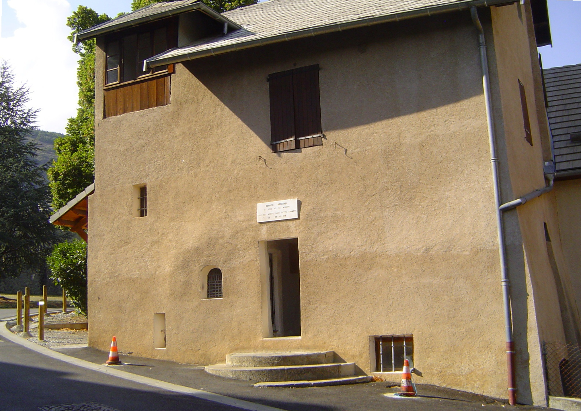 Photo prise à Notre-Dame-du-Laus